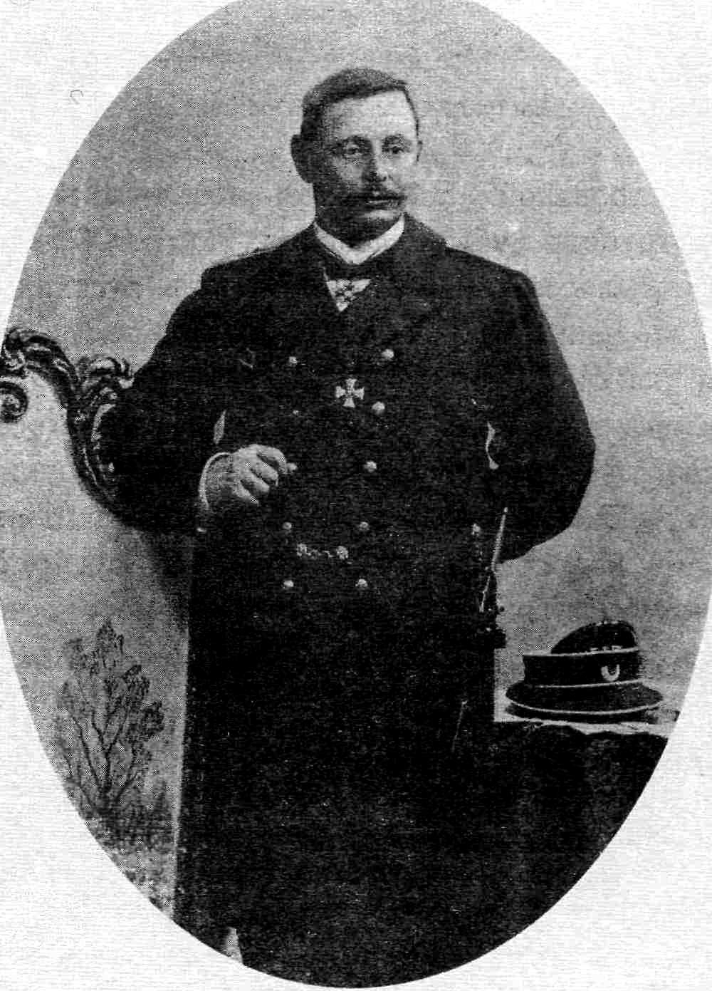 Владимир Владимирович Шельтинг, капитан 2-го ранга